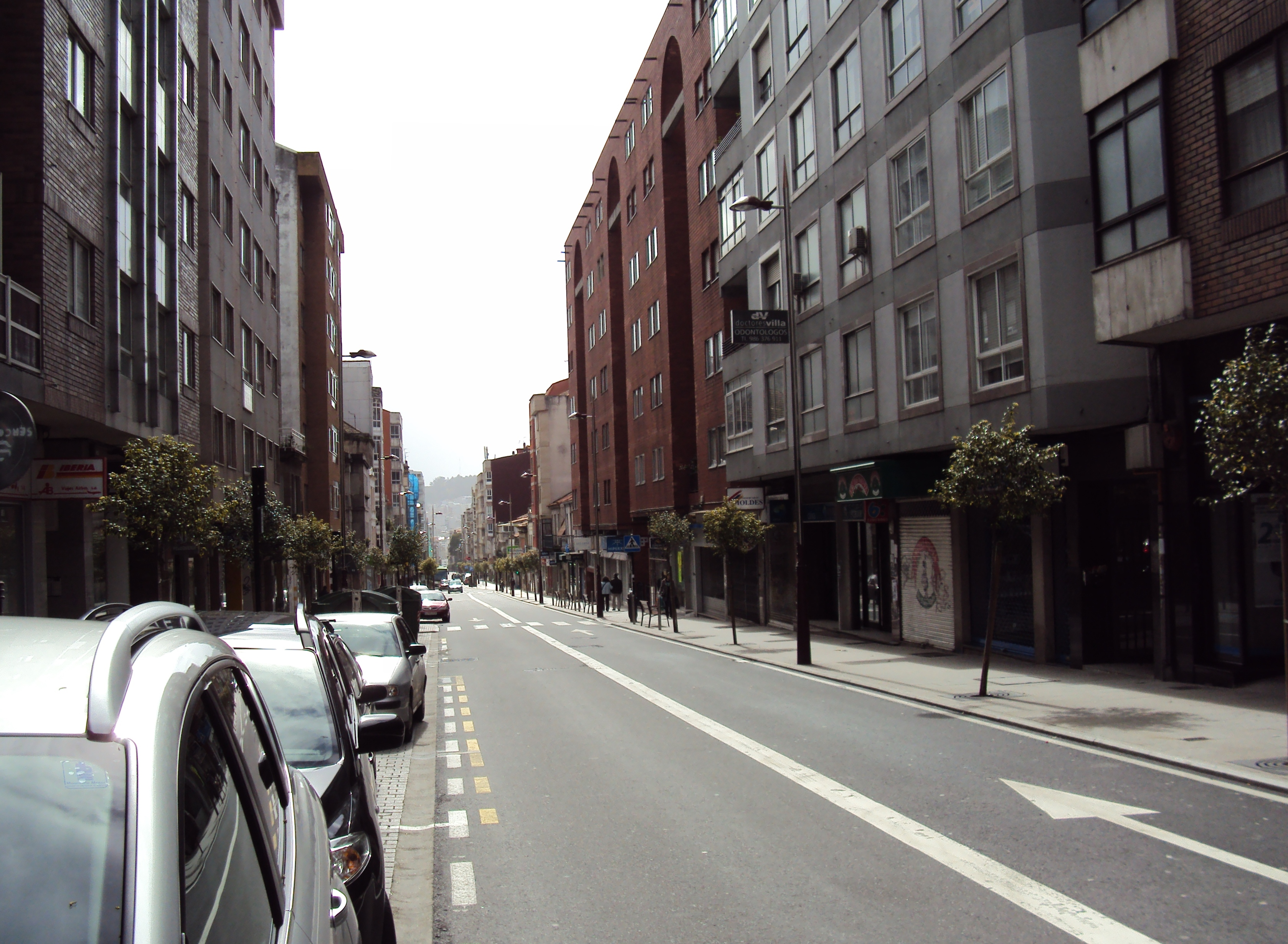 Rúa Sanjurjo Badía, Vigo, Galicia